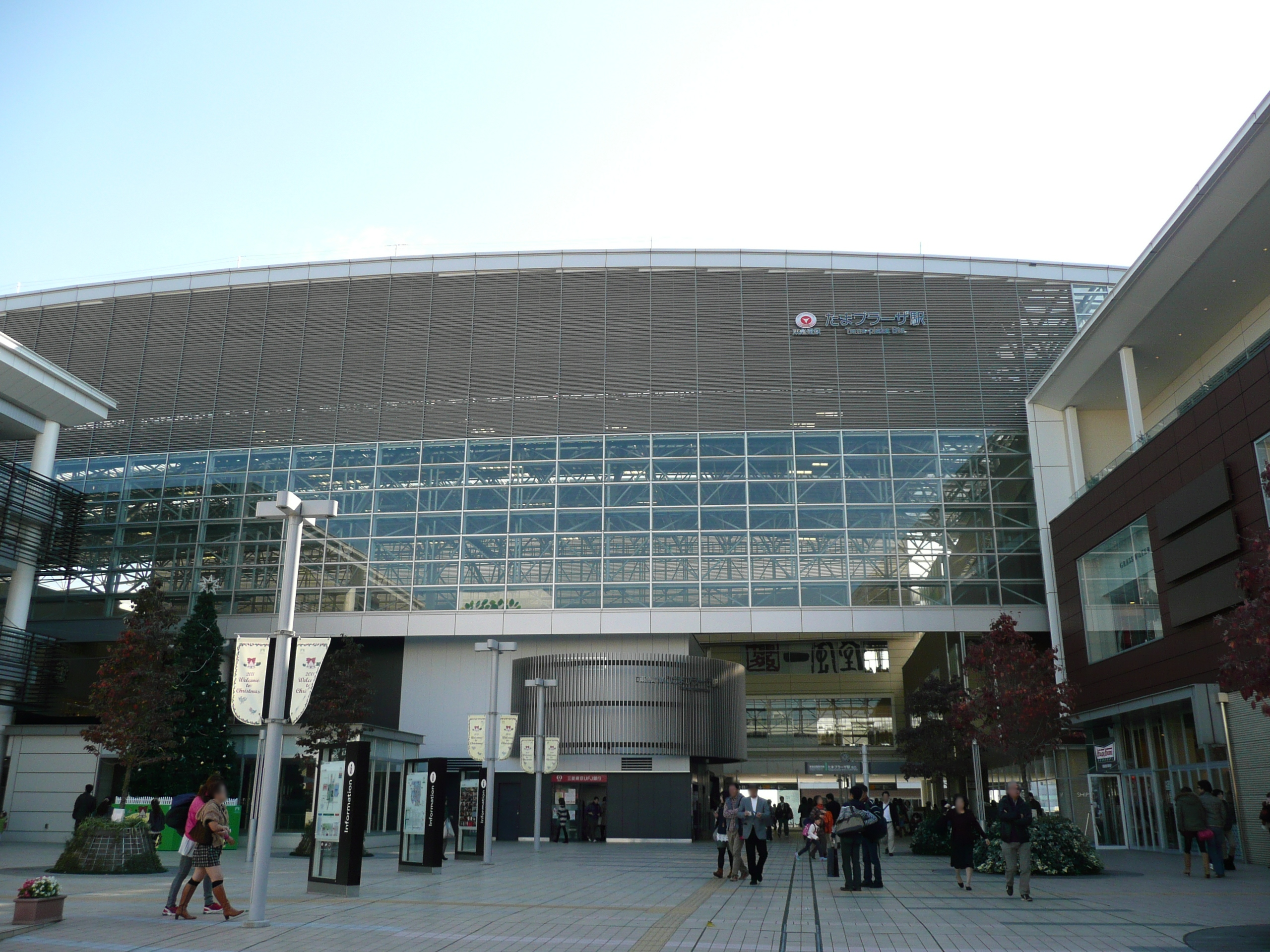 たまプラーザ駅北口